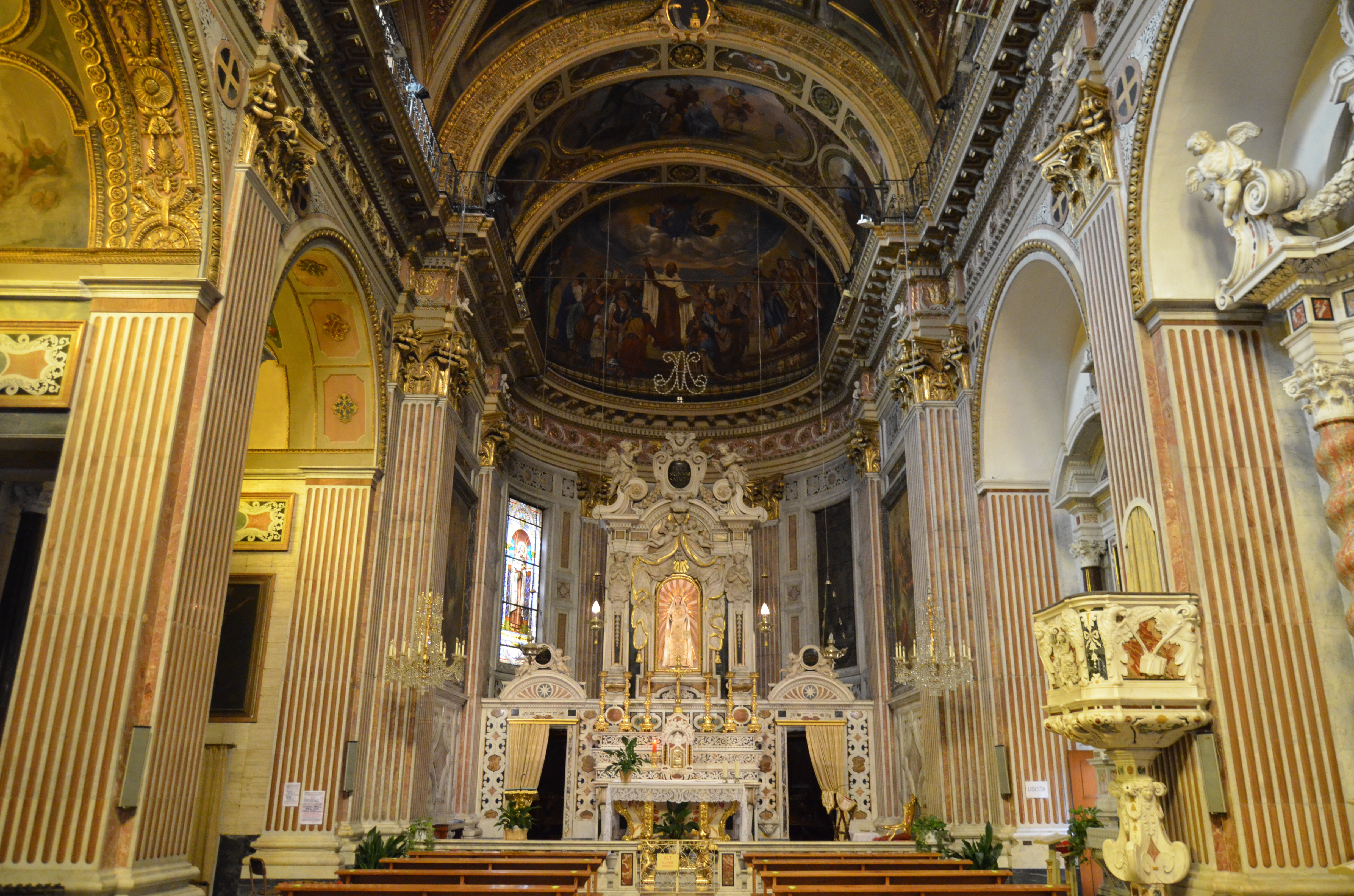 Santuario di Nostra Signora del Carmine, Lavagna, Liguria, Italia